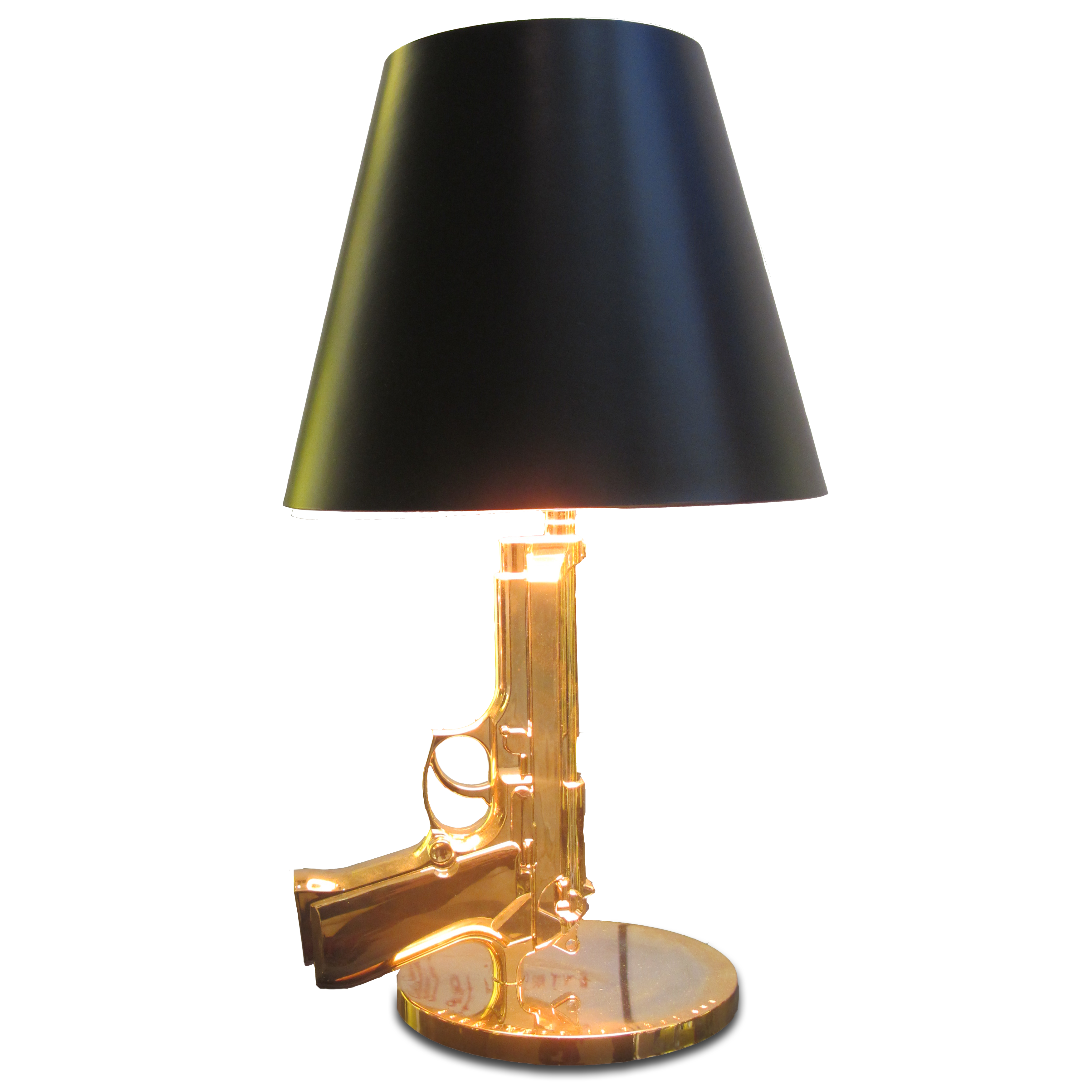 La lampada "GUN" di FLOS su sfondo bianco